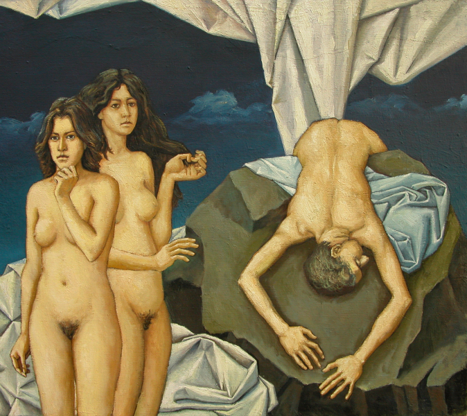 Peinture réalisée par l'artiste Achot Achot à la fin de sa période de « endoréalisme ».